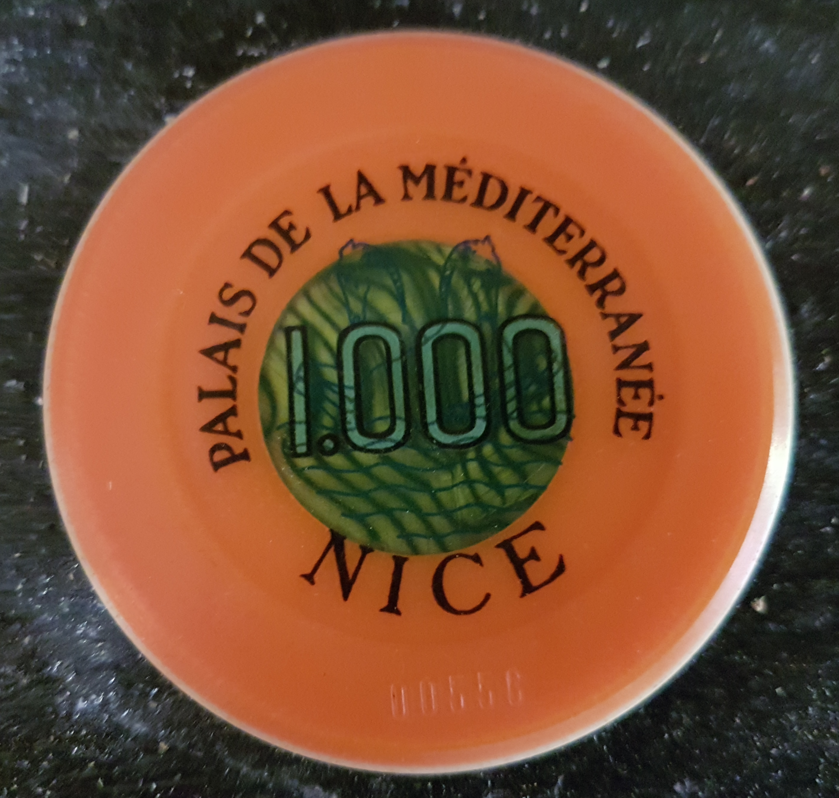 Jeton du Casino Palais de la Méditerranée Nice France